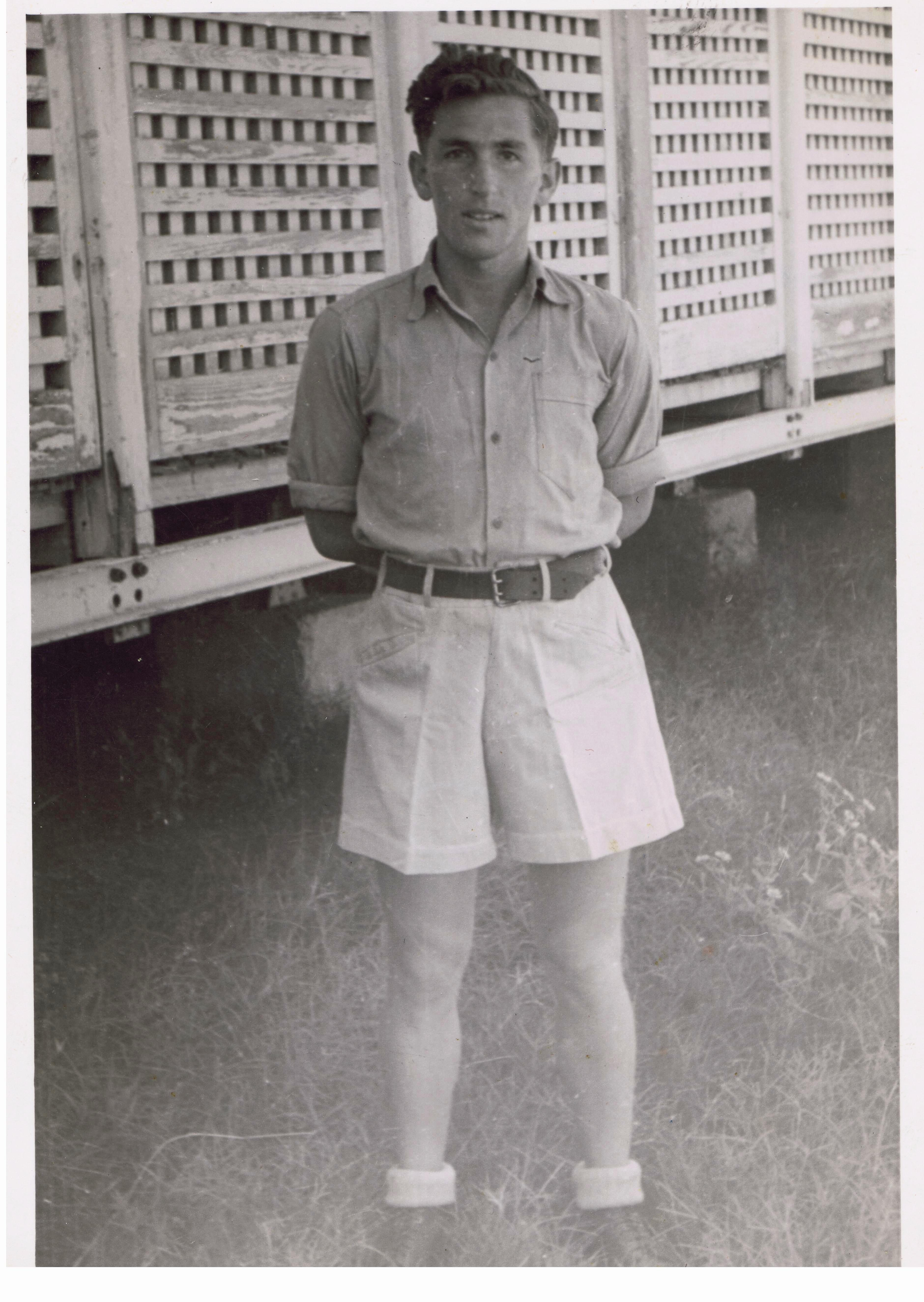 זאב איבינסקי כאסיר הלח"י במחנה מעצר בעת גלותו באריתראה